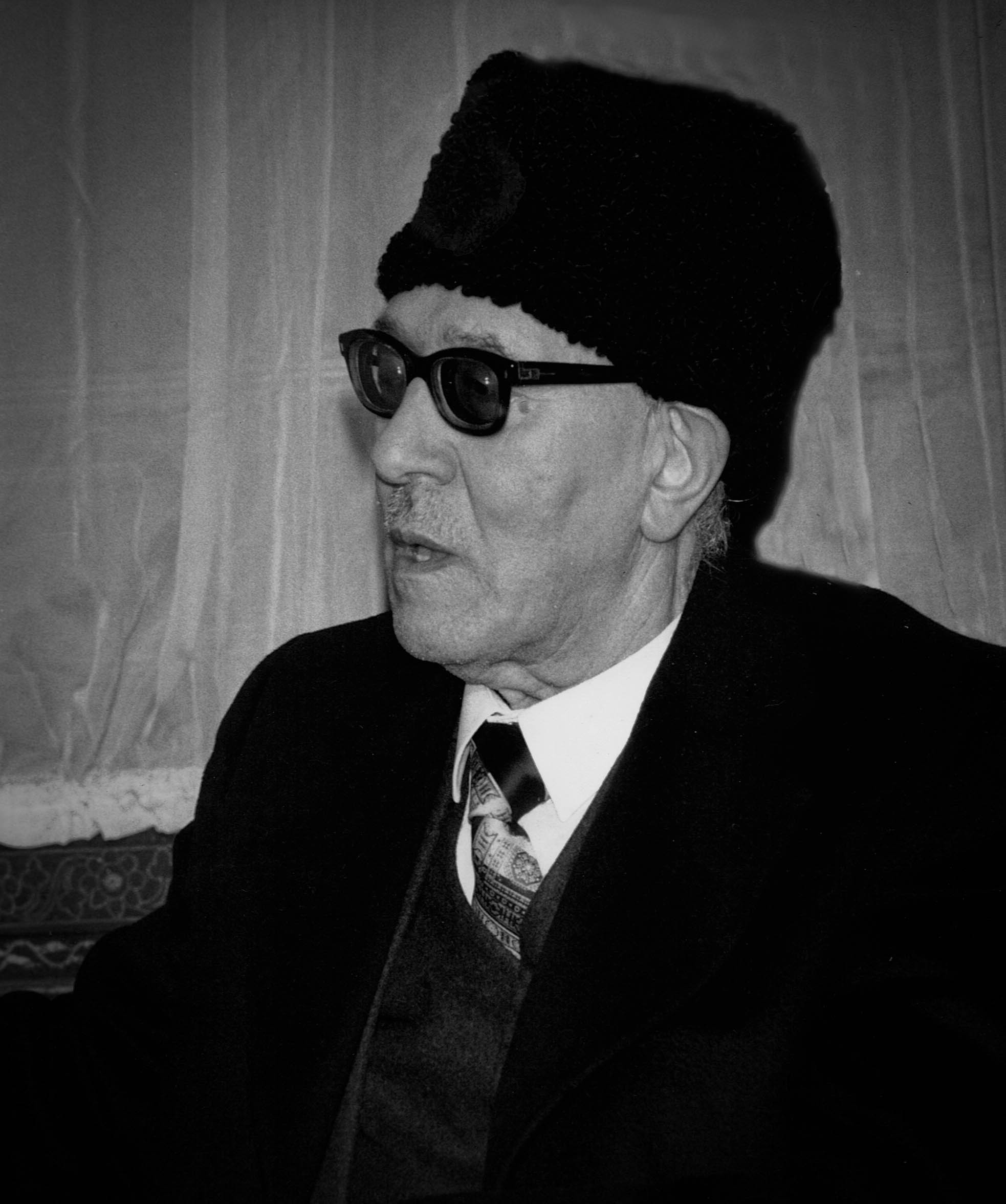 Cheikh Abbas Bencheikh el Hocine - recteur de la Grande Mosquée de Paris (1982-1989) Mosquée de Paris